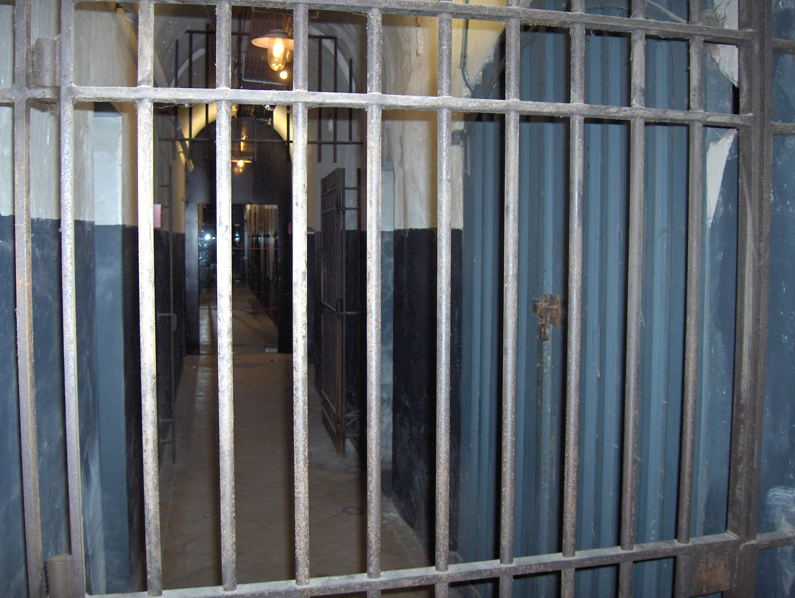 Passageway inside the Fort van Breendonk, Belgium